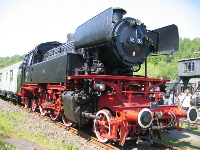 Dampflokomotive 66 002 in Bochum-Dahlhausen Mai 2005